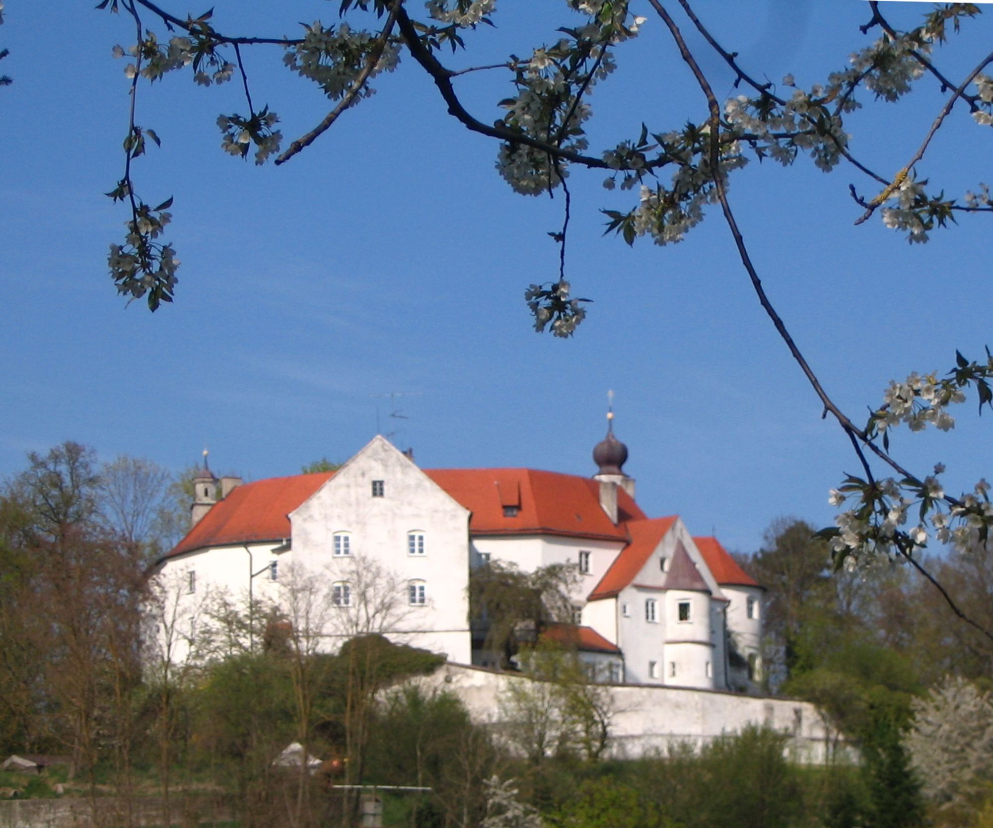 Schloss Wildenberg, Landkreis Kelheim, Niederbayern